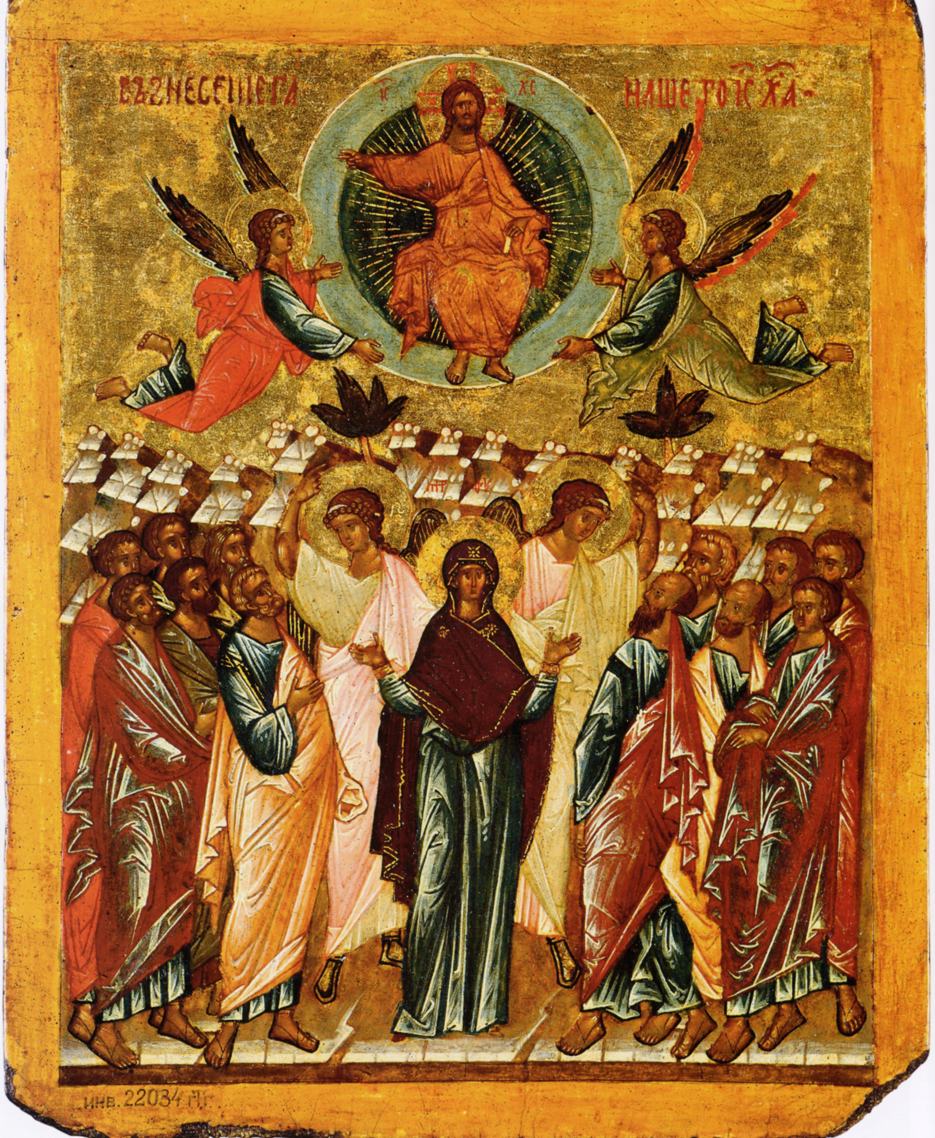 Икона «Вознесение» (двусторонняя икона-таблетка). Размер: 24,5 х 20 см Материал: Дерево, темпера Конец XV века. Место хранения: Новгородский государственный объединенный музей-заповедник Иконография: Страстной и Пасхальный циклы